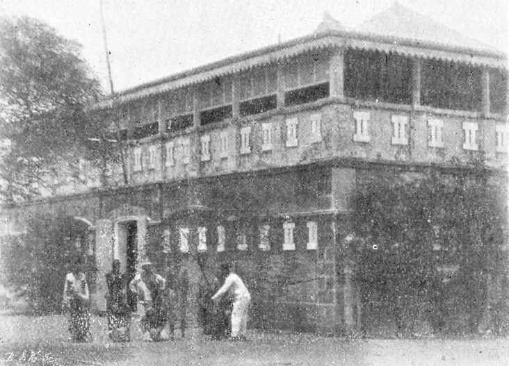 Fort de Cotonou